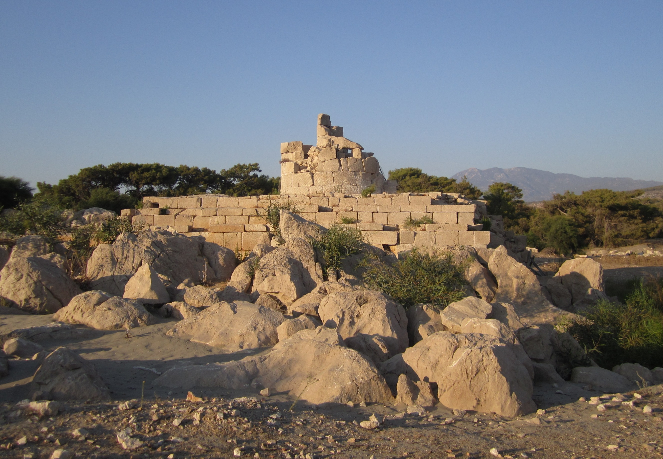 Antiker Leuchtturm in Patara